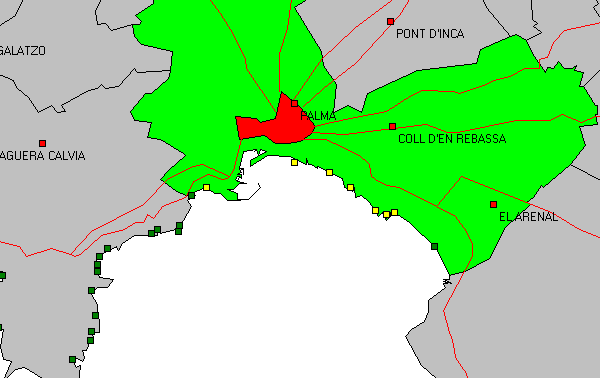 Skizze Playas Palma